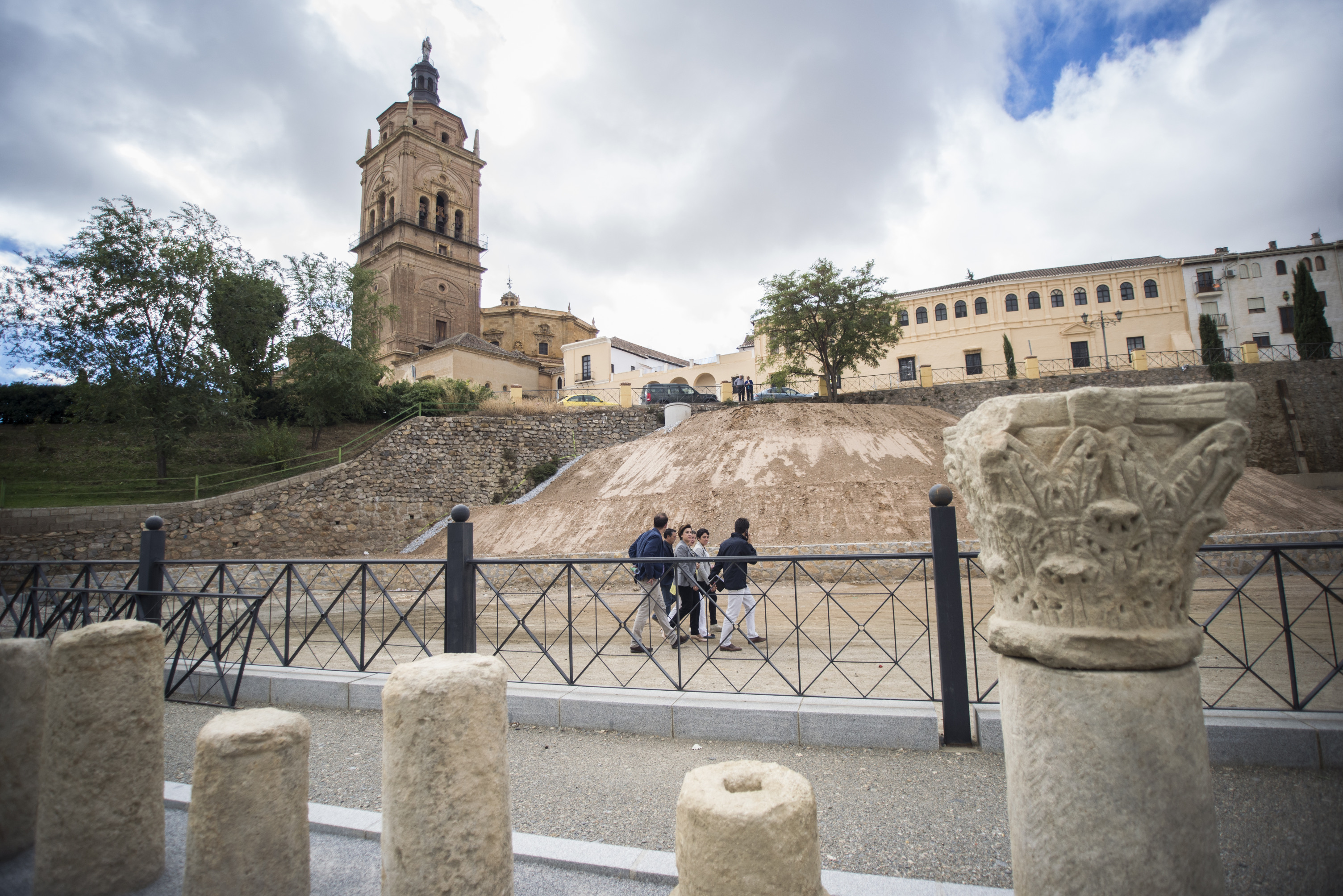 Guadix